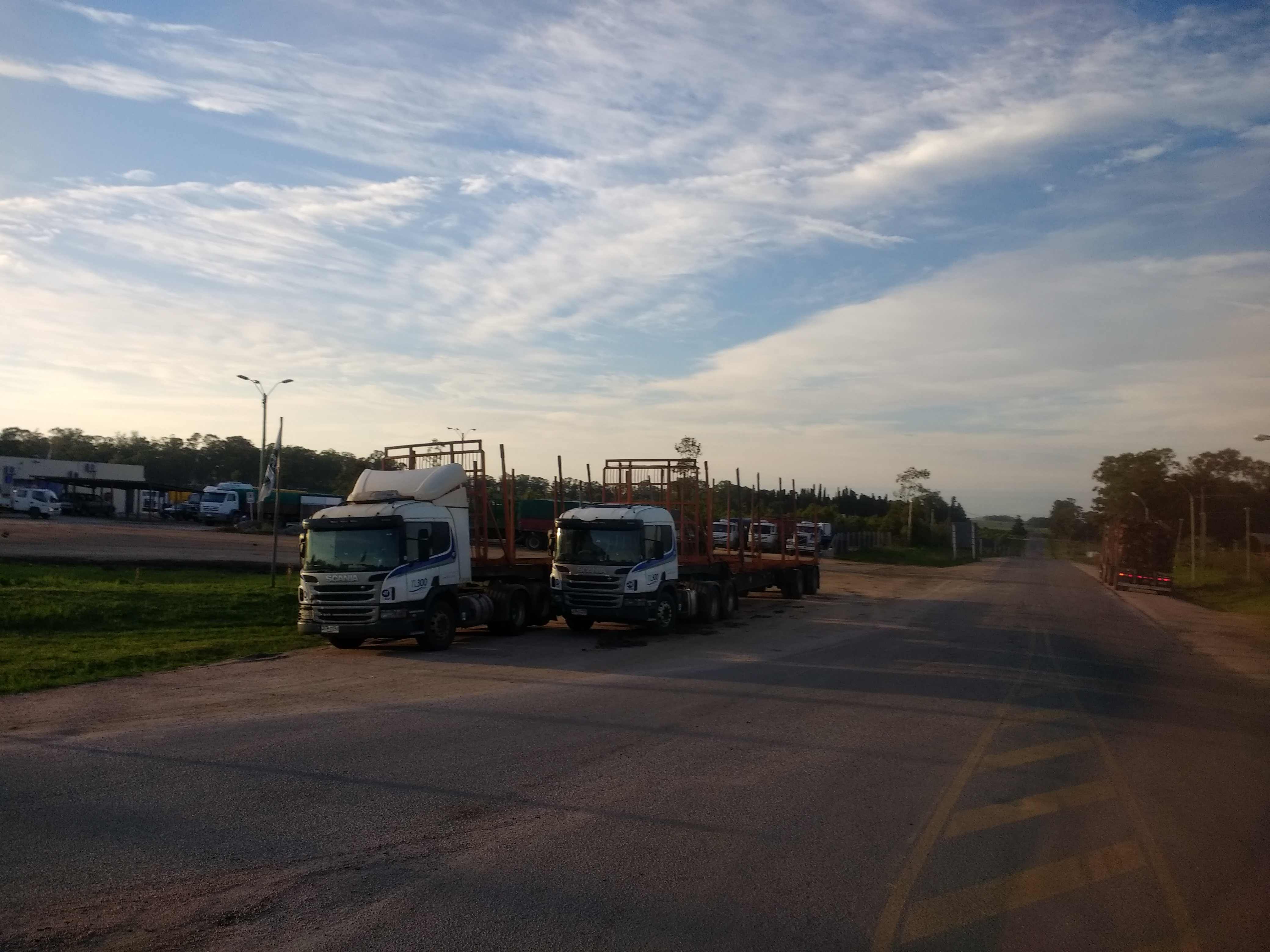 Ruta 57 en el departamento de Flores.